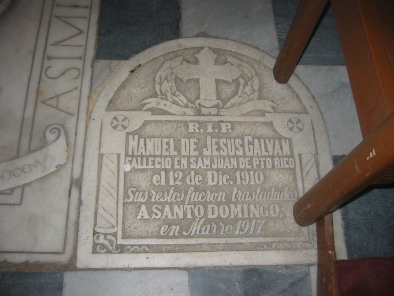 Tumba del Novelista, diplomático, periodista y hombre publico. Situada dentro de la Catedral de Santo Domingo.